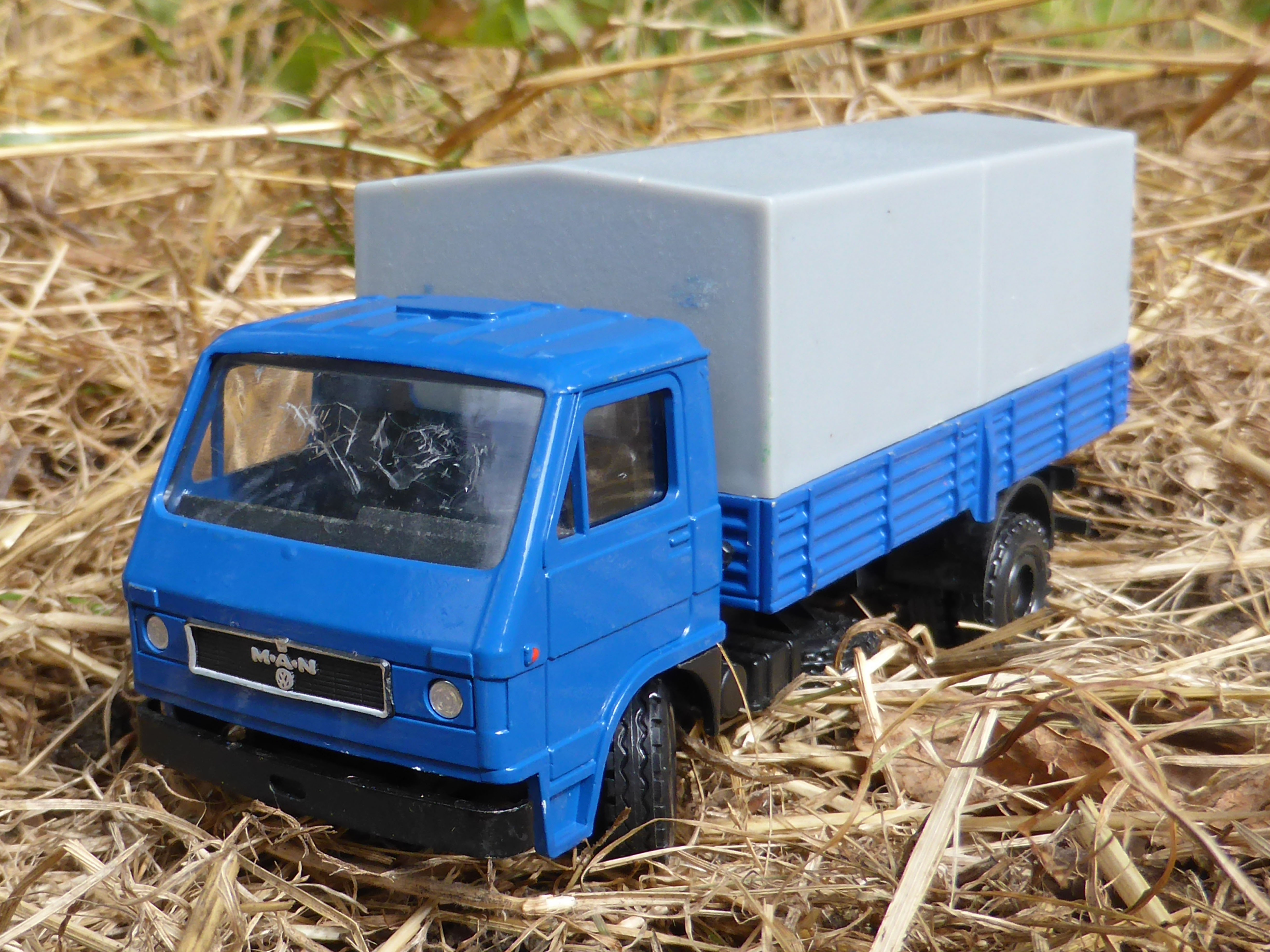 Modellauto des MAN-VW von Conrad.